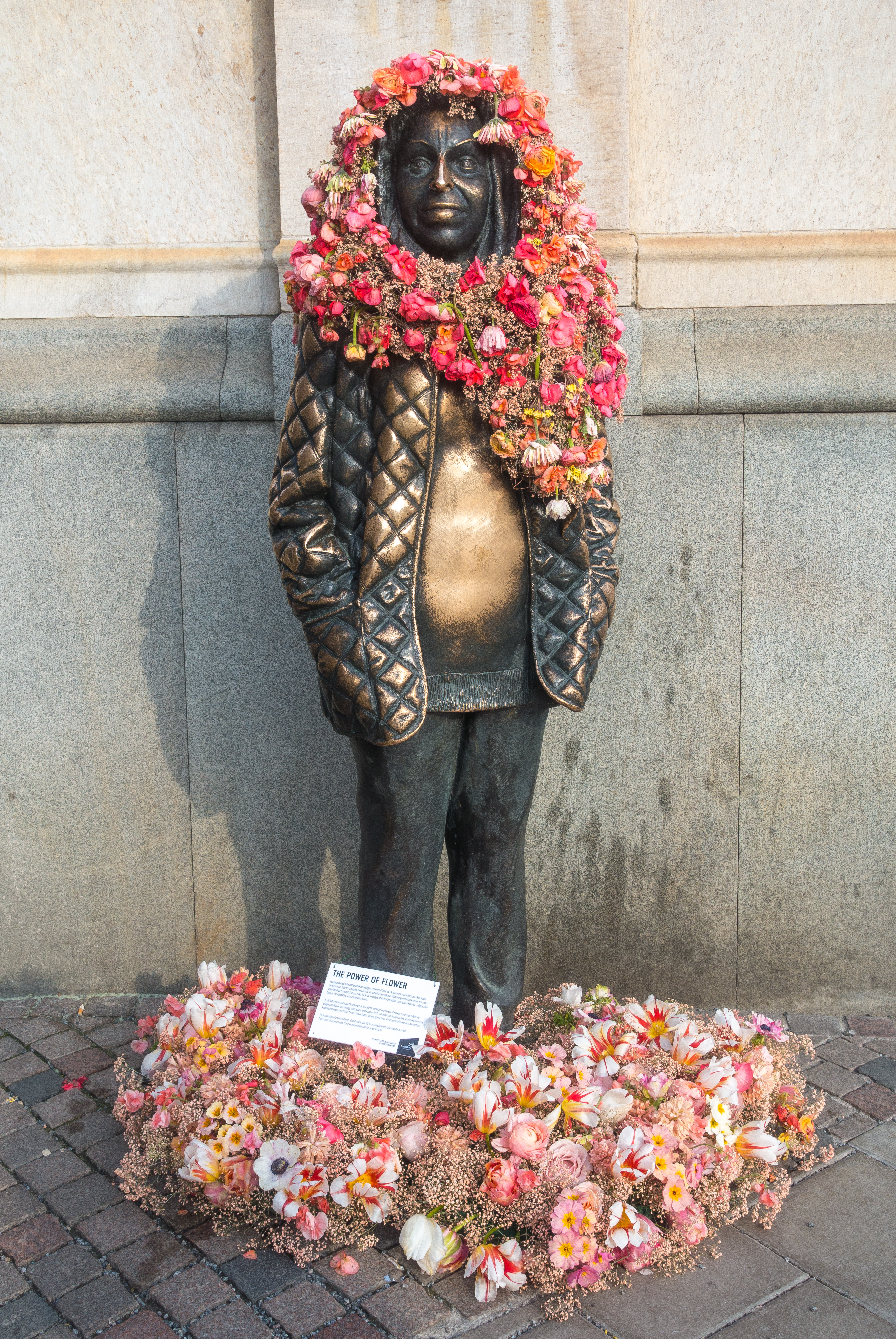 Staty föreställandes Margaretha Krook (1925-2001) utanför Dramaten i Stockholm, av Marie-Louise Ekman (född 1944). Smyckad med blommor inför Internationella kvinnodagen som en påminnelse om att enbart ca 10% av Sveriges statyer föreställer namngivna kvinnor.